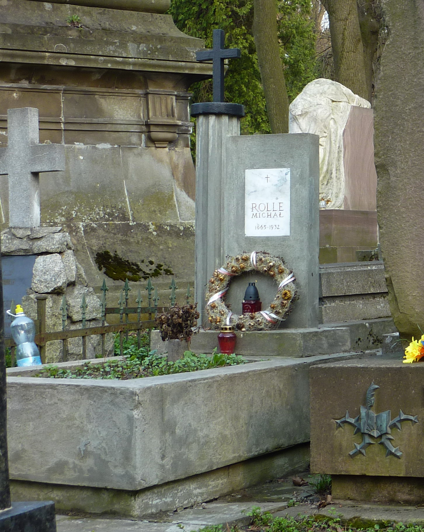 Grób Michała Rolle na cmentarzu Łyczakowskim we Lwowie